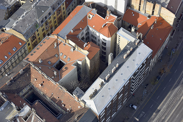 Városfal maradvány légi felvételen